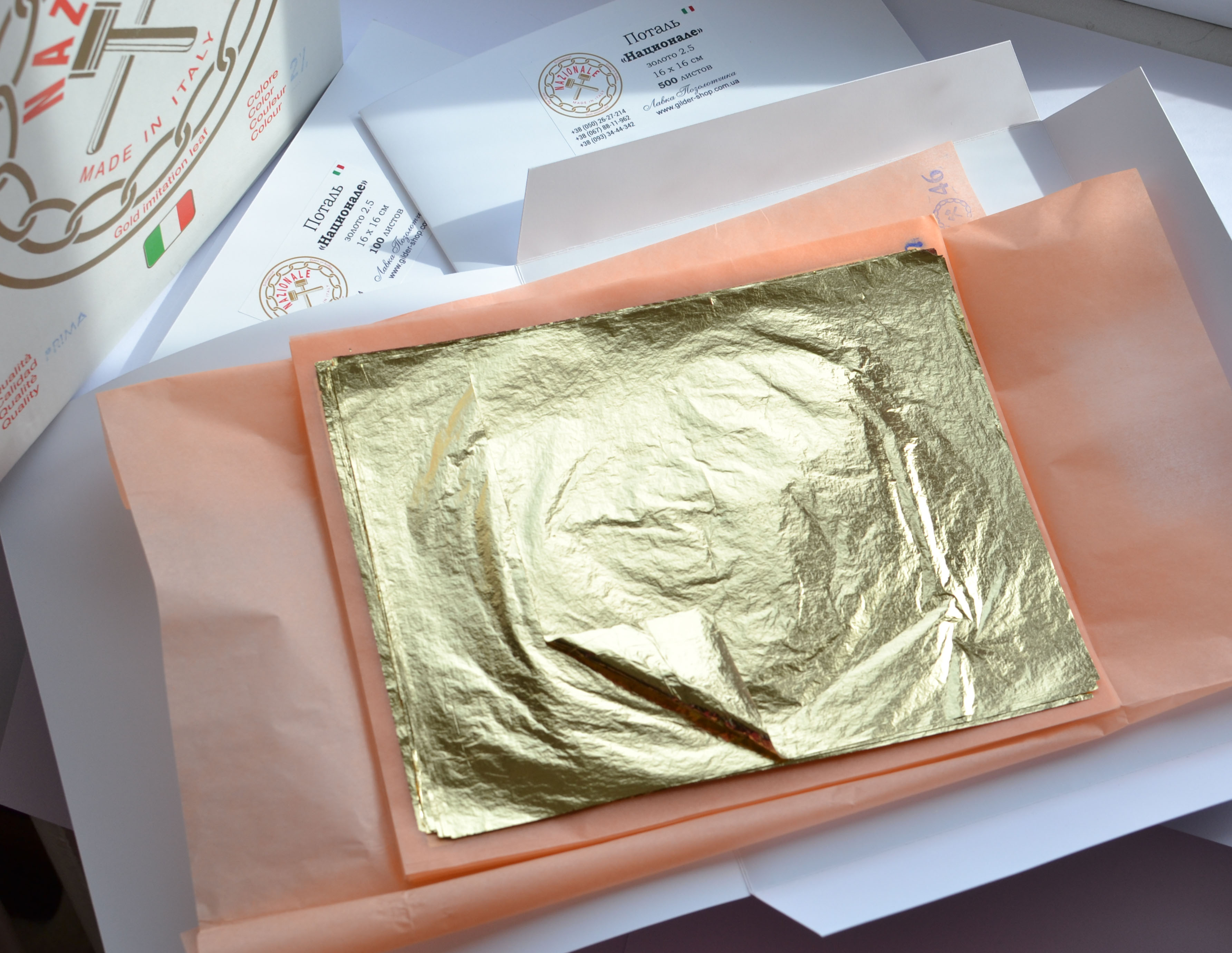 Свободная листовая поталь бывает в формате 16см*16см переложена тонкой бумагой через 100 листов